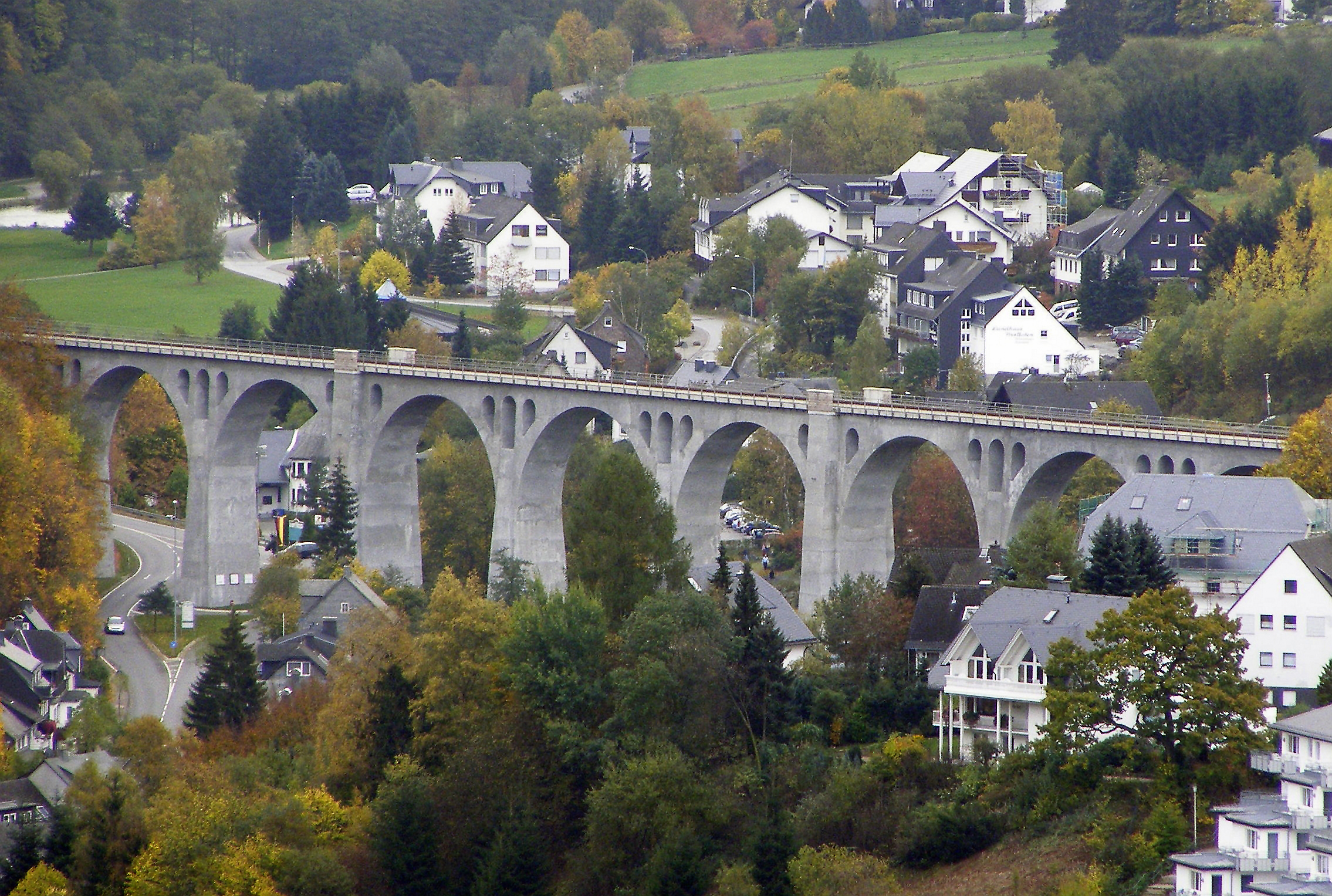 Viadukt Willingen (Upland)/Hessen, Germany